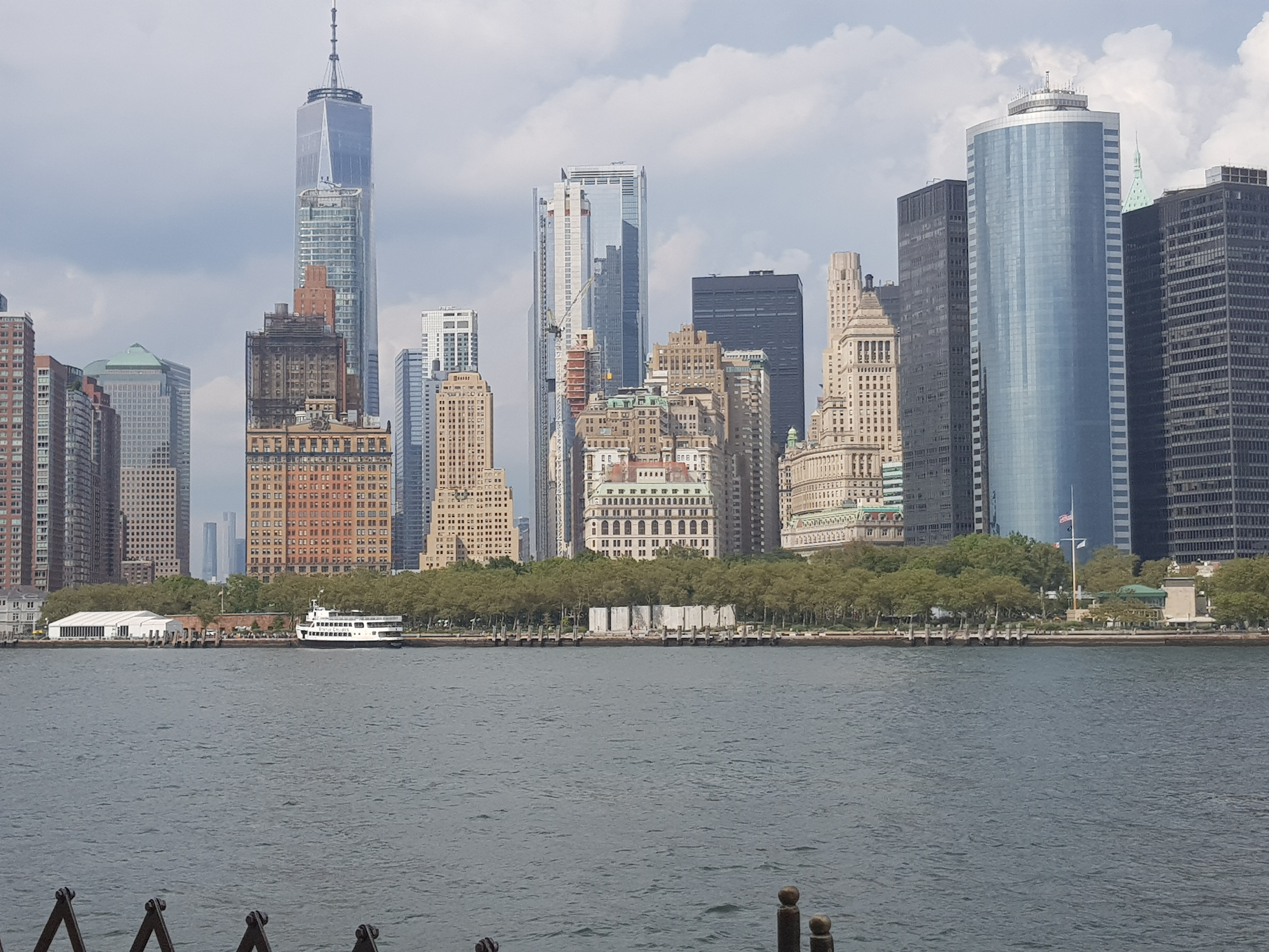 מבט אל הבאטרי פארק מהים